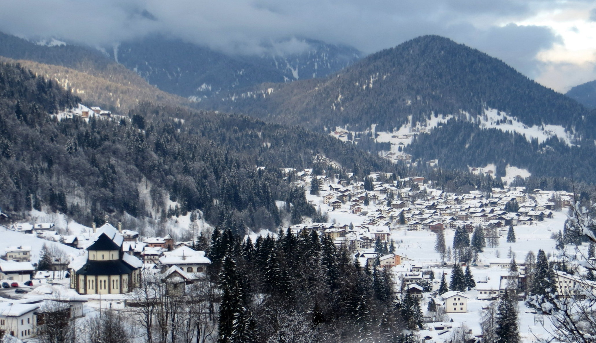 Veduta di Falcade (Belluno)